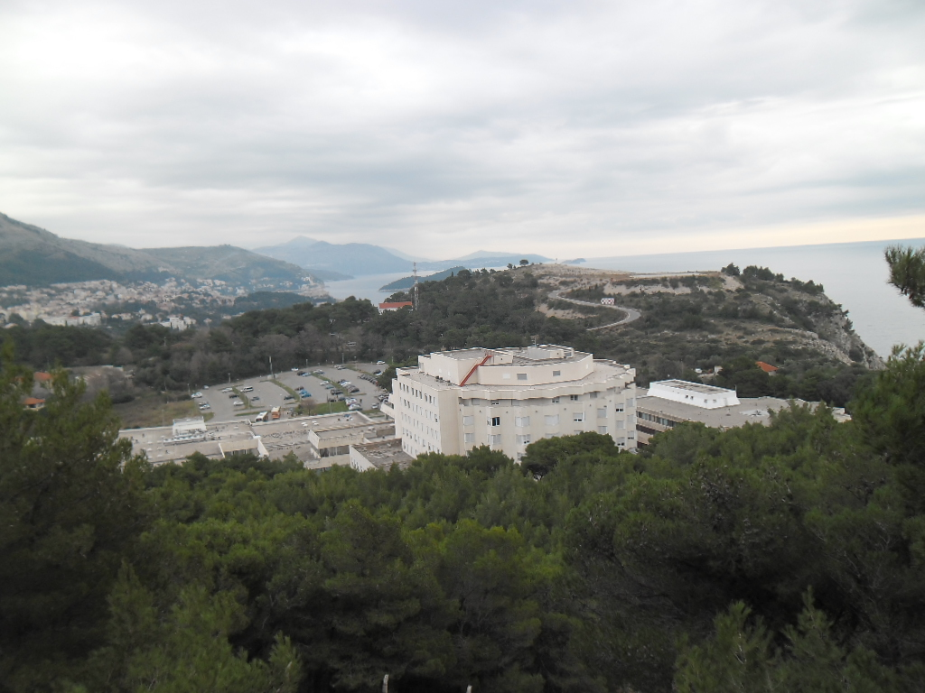 Medarevo na kojem je Opća bolnica Dubrovnik gledano s Petke